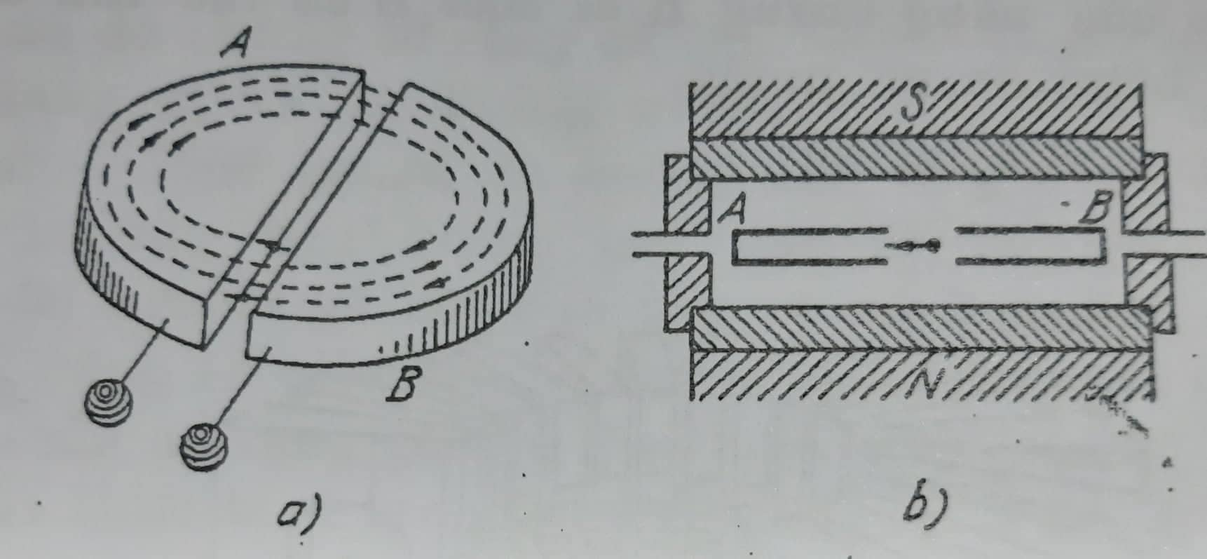 jh